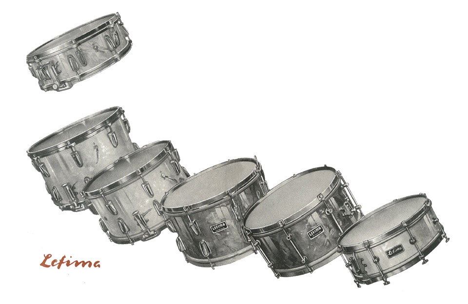 Titelbild Katalog von 1922